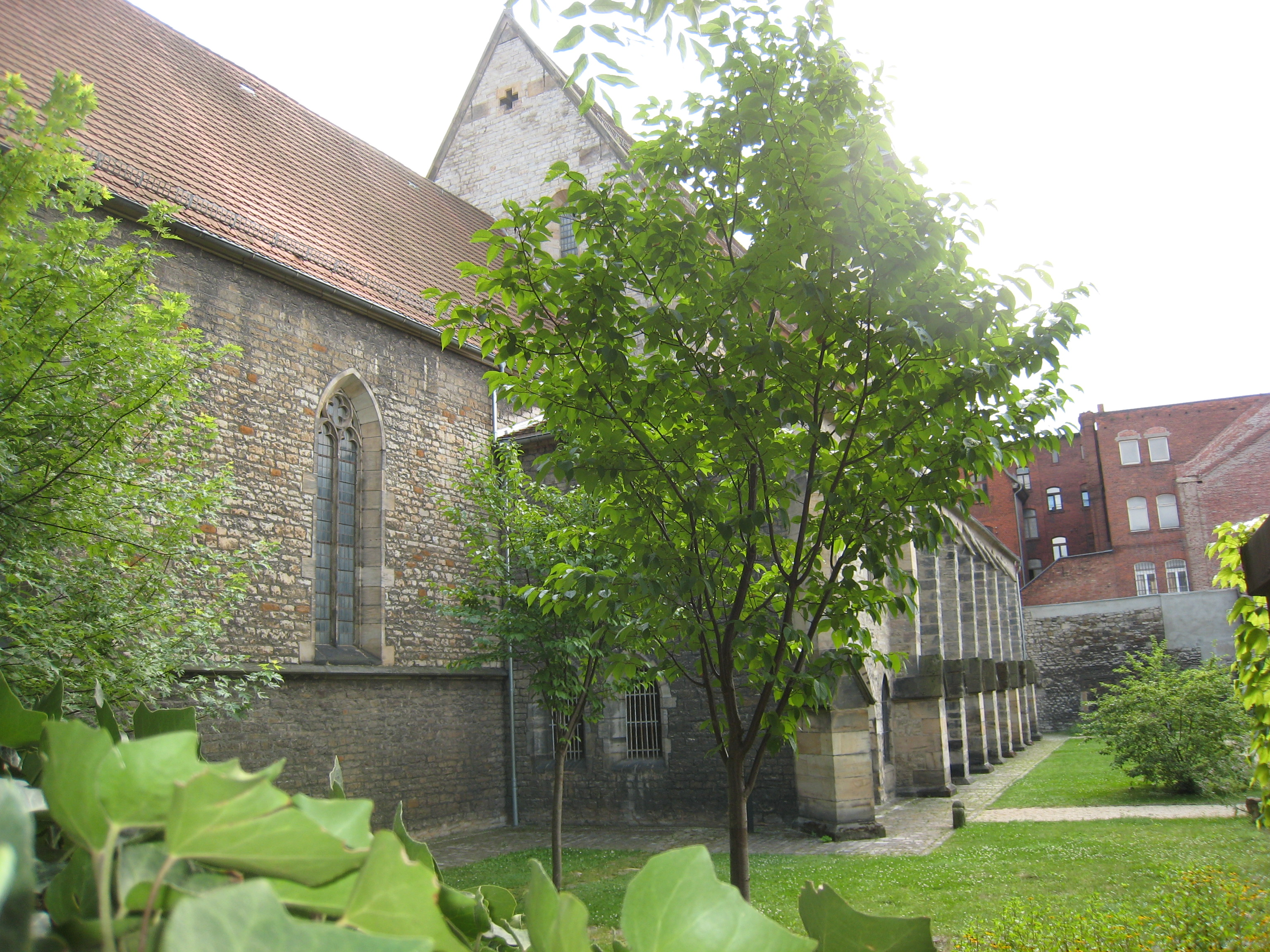 Hof hinter der Reglerkirche Erfurt